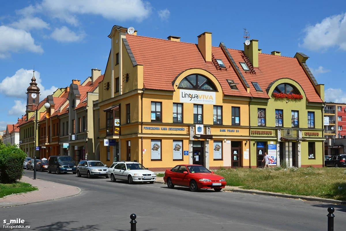 Chrobrego 6 - budynek PKO BP i Linqua Viva. Dewocjonalia/Księgarnia to już Piastowska 6